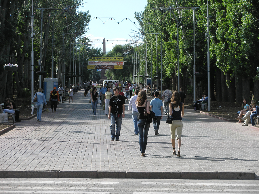 Волгоград. Аллея Героев Аллея Героев в Волгограде